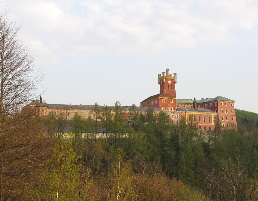 Hrad Mírov-pohled od Z